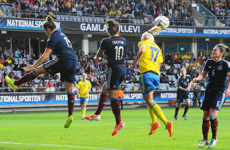 a_71_1852